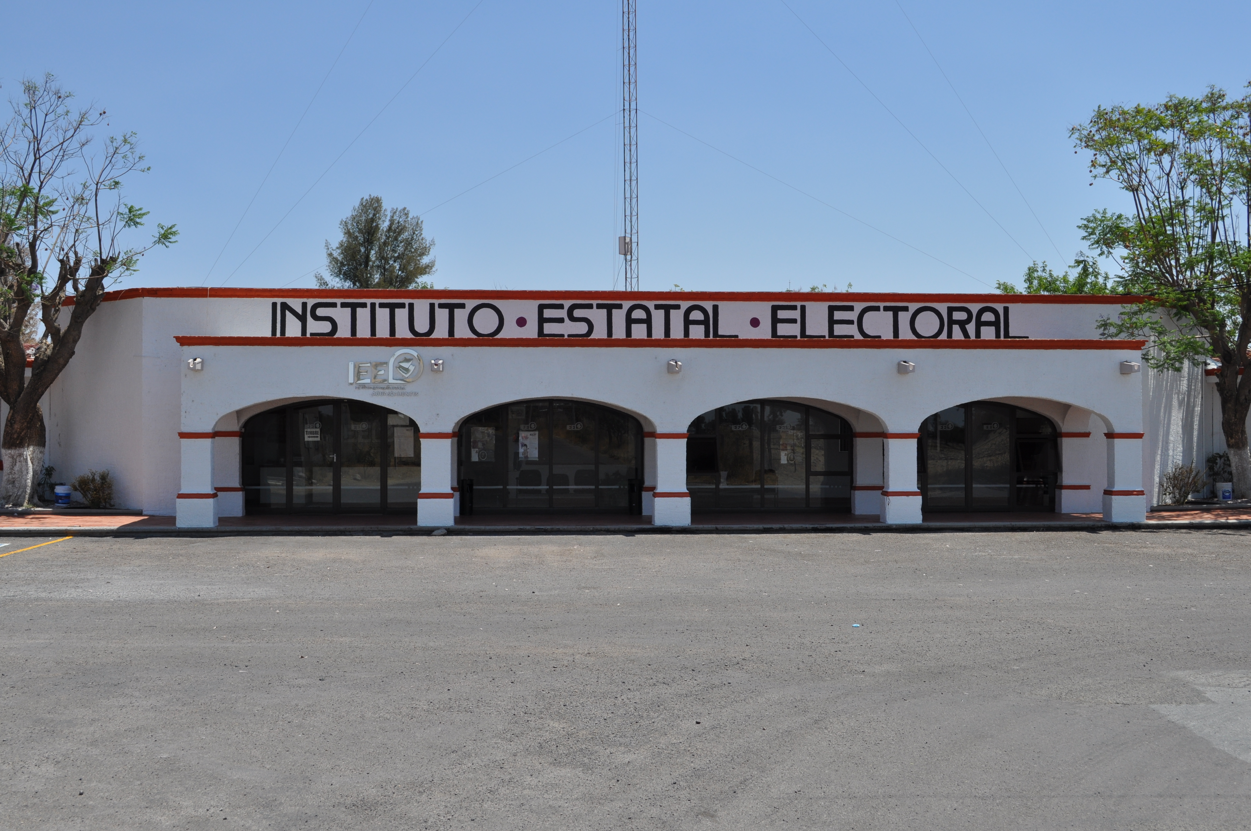 Fachada del Instituto Estatal Electoral de Aguascalientes